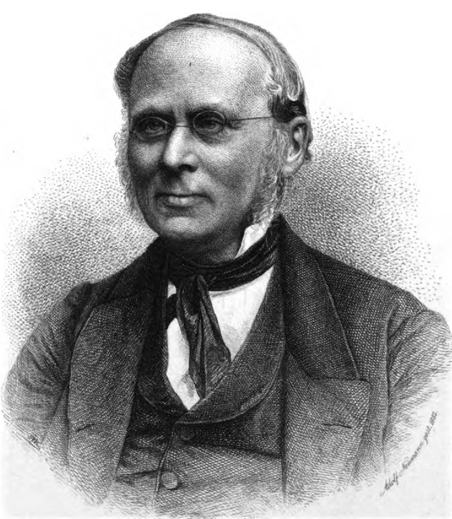 Heinrich Otte. In: Handbuch der kirchlichen Kunst-archäologie des deutschen Mittelalters. 5. Auflage. Leipzig: Weigel, 1883